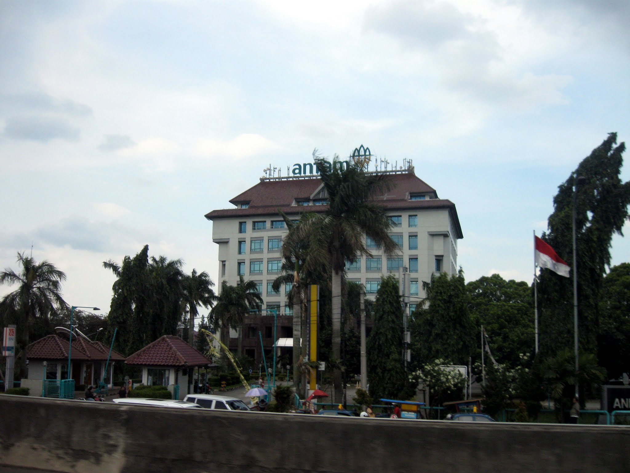 PT Antam Tbk, TB Simatupang, Jakarta Selatan